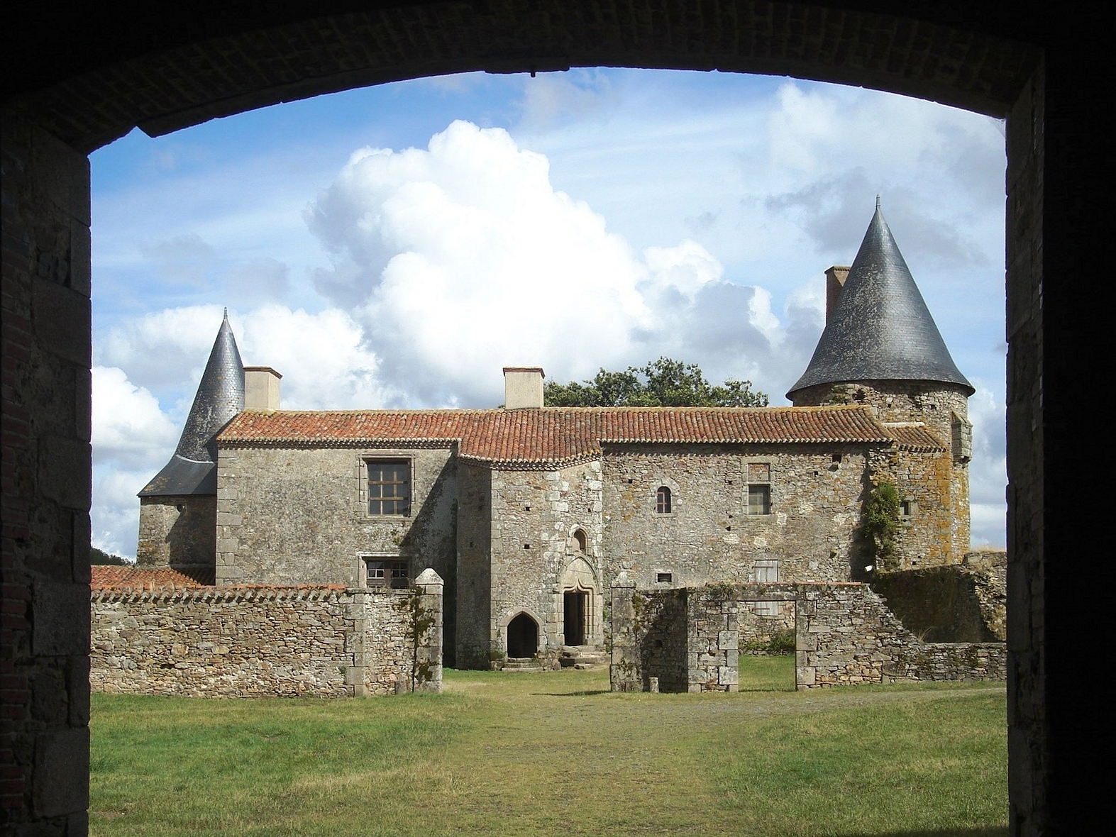 Château de la Grève, (Inscrit, 1984) .